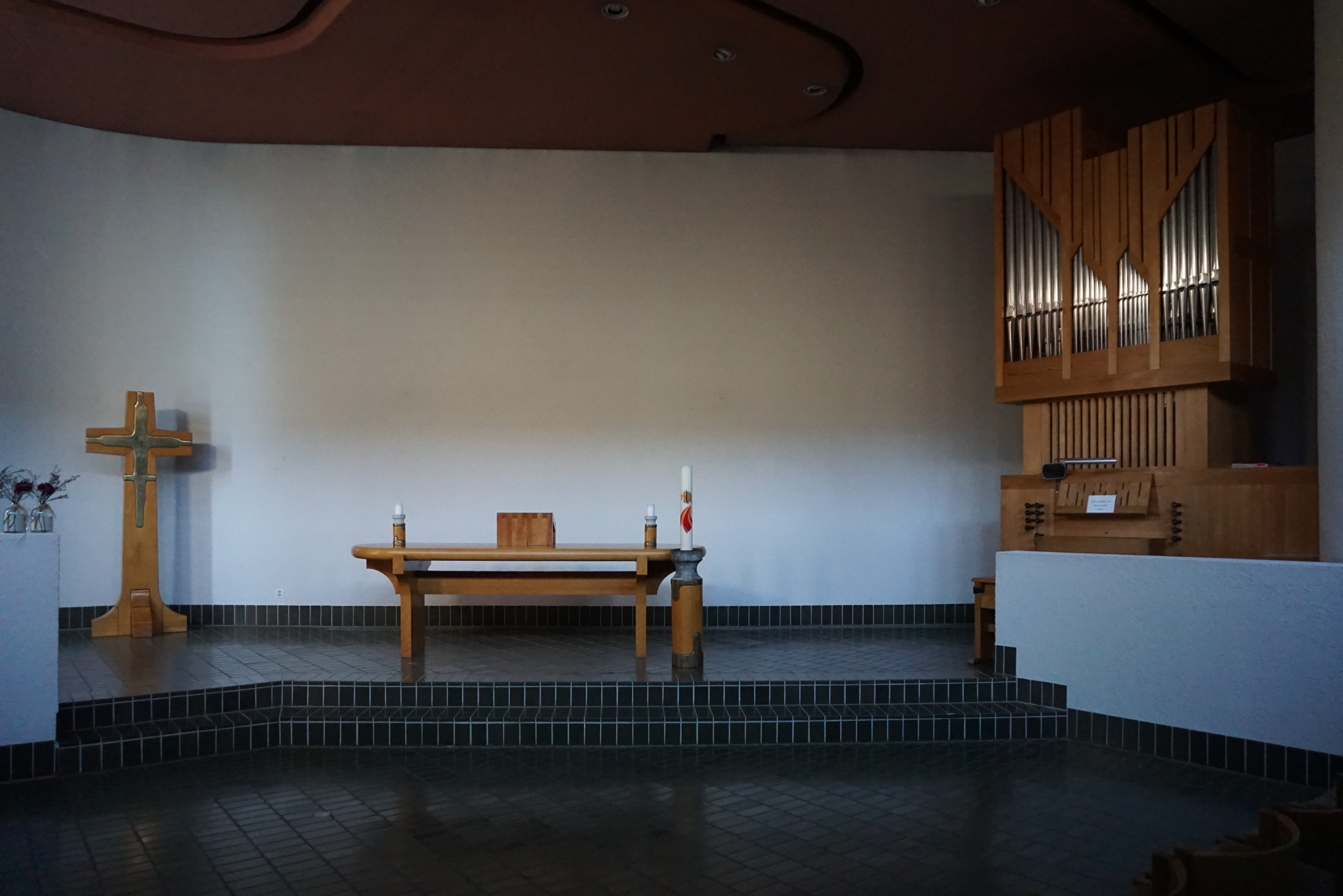 Oekumenisches Zentrum St. Andreas in Kehrsatz, Chorraum mit Orgel